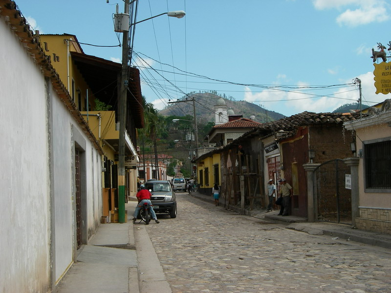 Village actuel de Copán